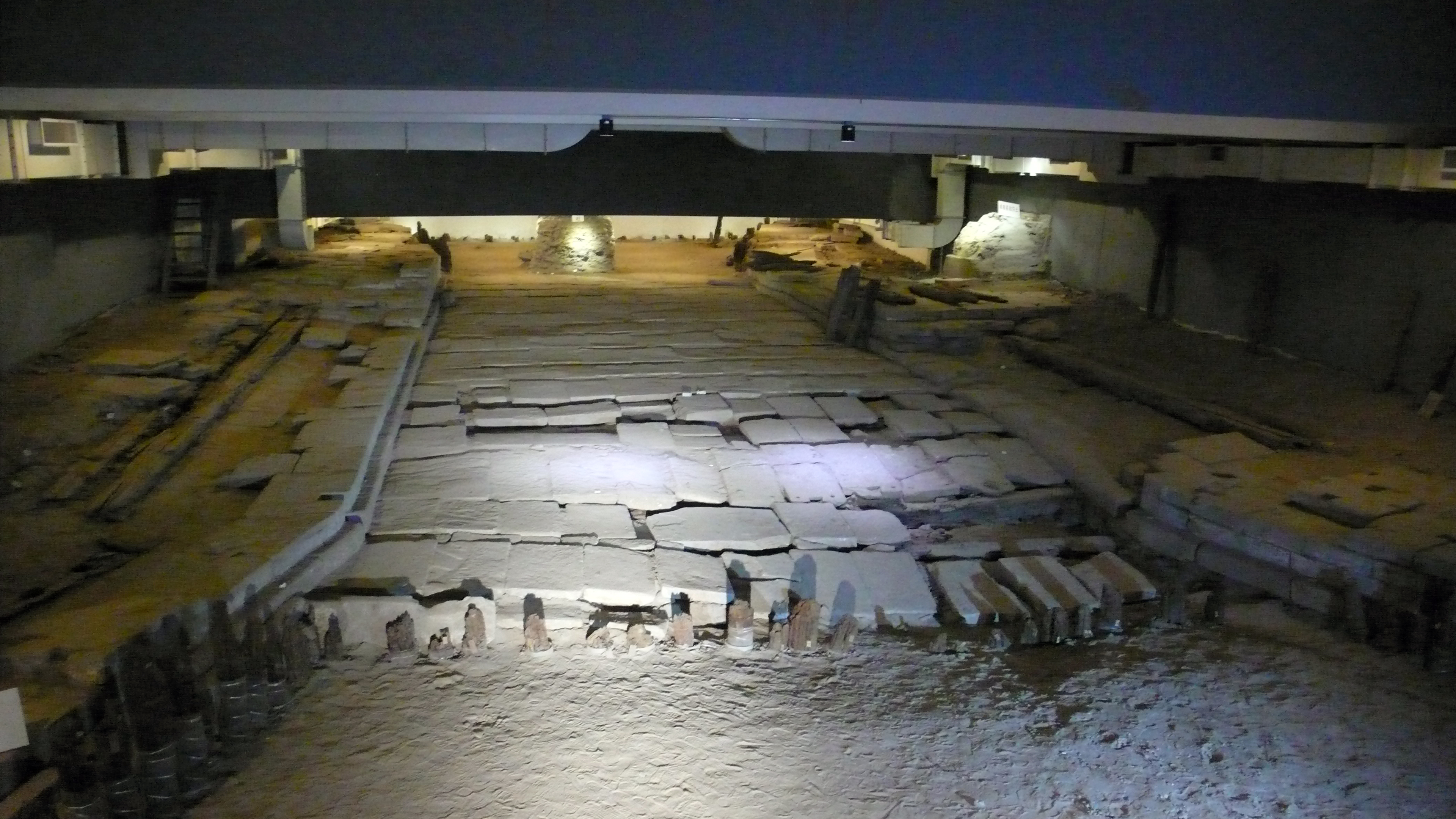 金中都水关遗址。位于辽金城垣博物馆地下。